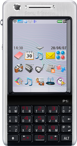 Sony Ericsson P1i